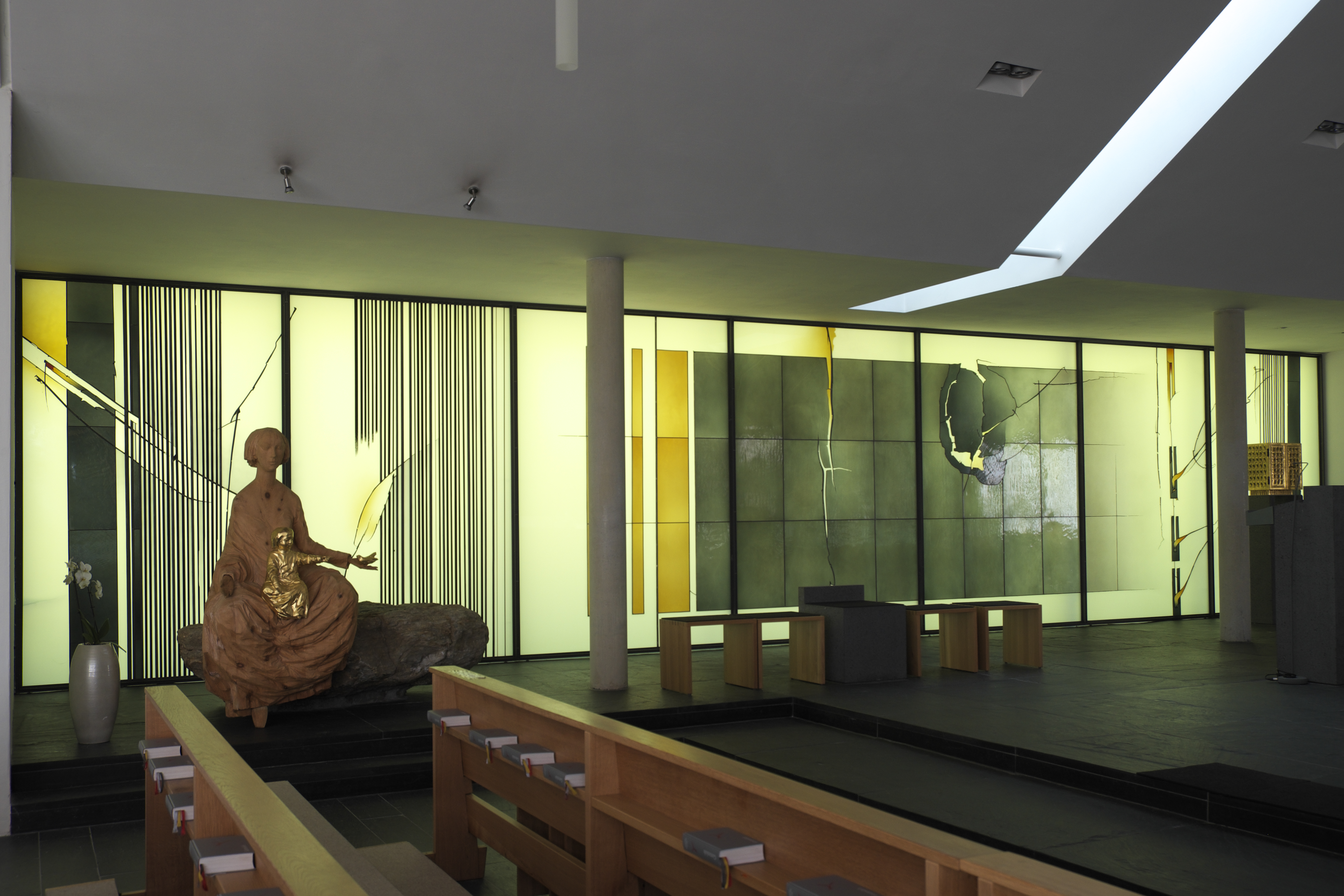 Wallfahrtskirche des Augustinerklosters Maria Eich in Planegg im Landkreis München (Bayern, Deutschland)